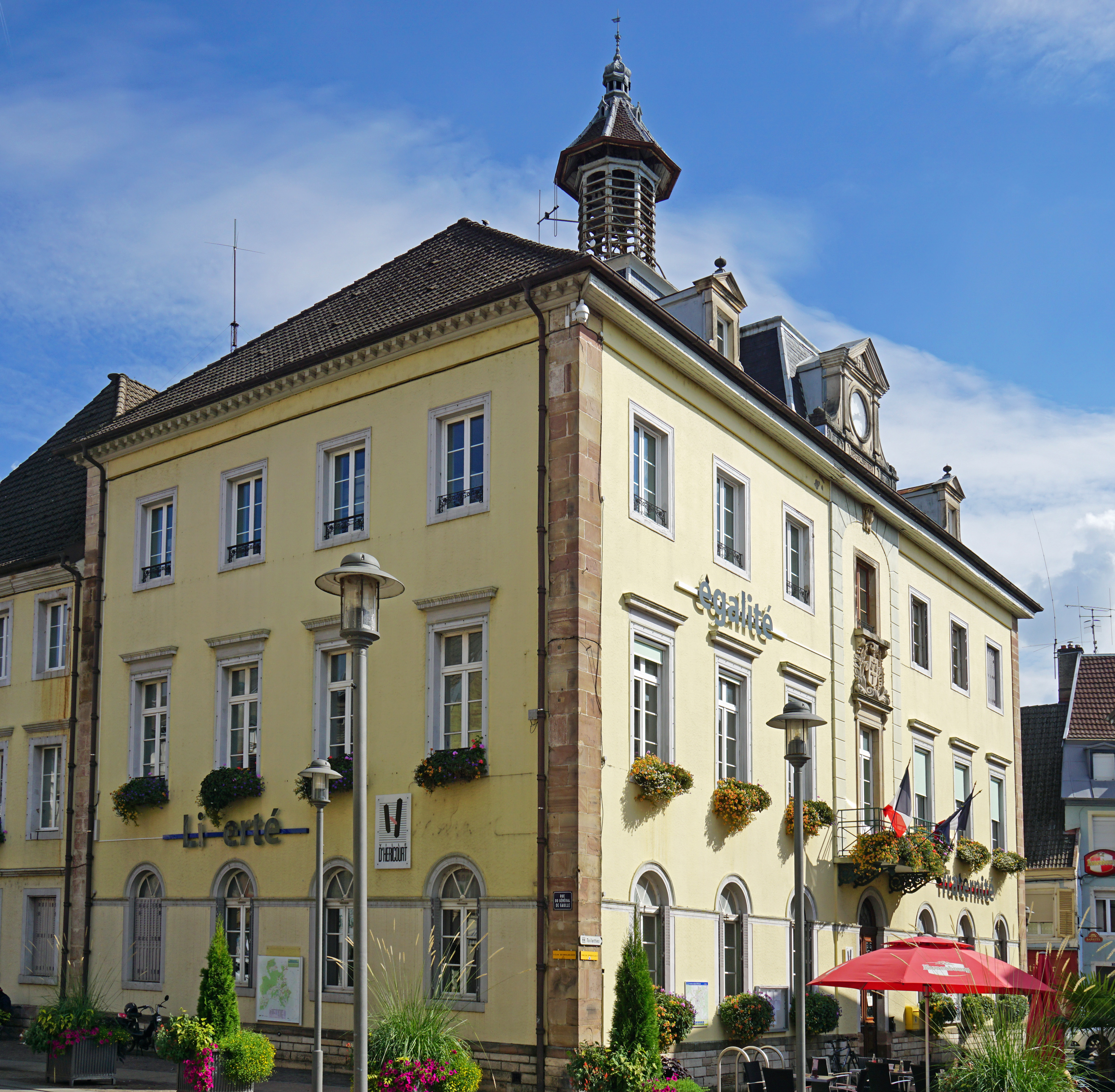 L'hôtel de la ville d'Héricourt surmonté d'un clocheton.